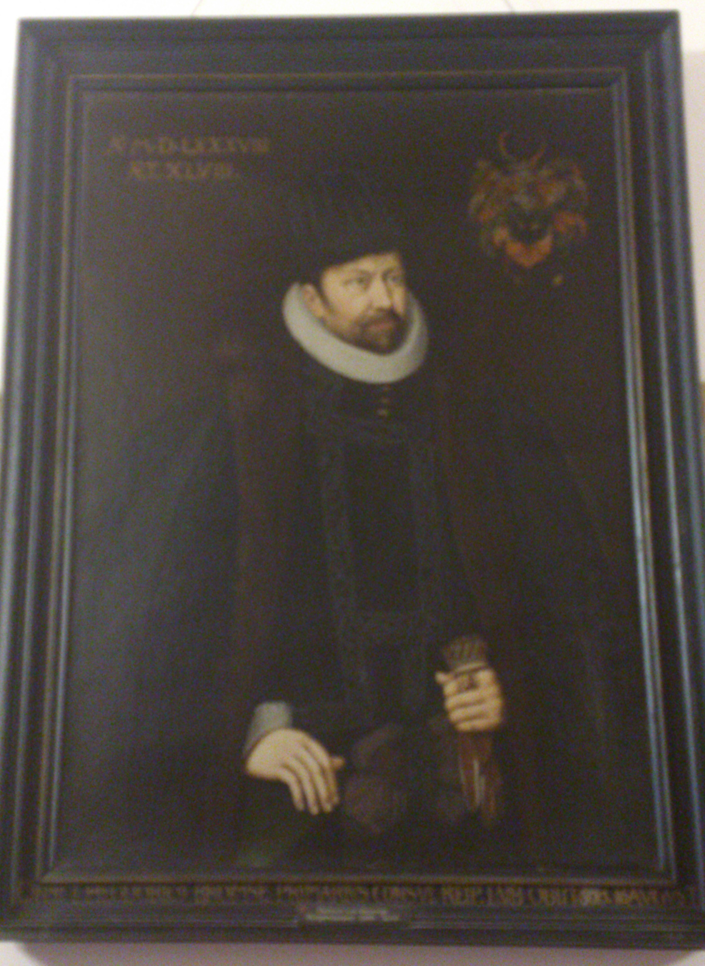 Zeitgenössisches Gemäldeporträt des Bürgermeisters Dietrich von Broemse in der Bürgermeistergalerie des Rathauses der Hansestadt Lübeck. Aufgenommen am 14. Juli 2016.